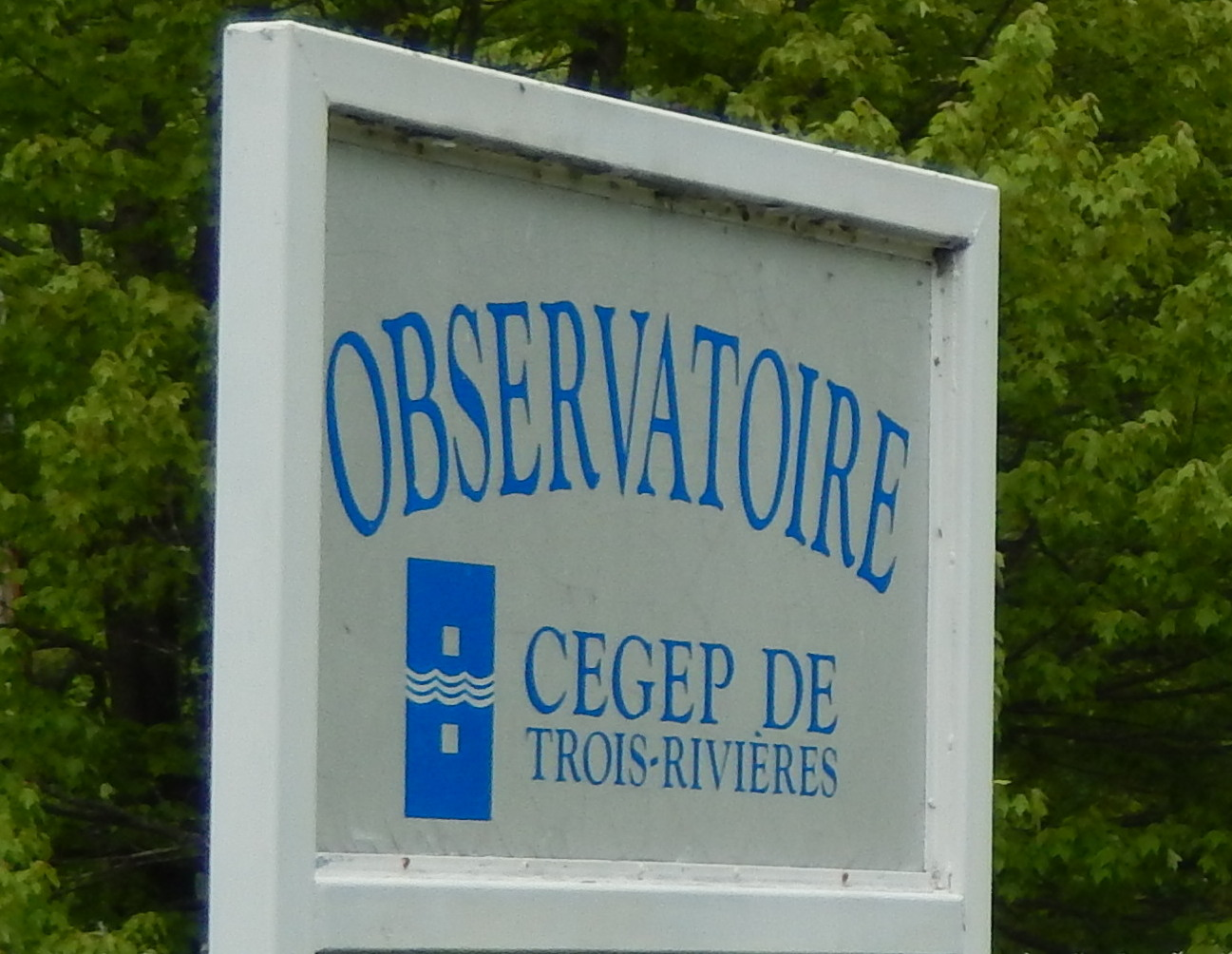 Observatoire du Cégep de Trois-Rivières